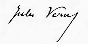 Jules Verne (1828-1905) signature